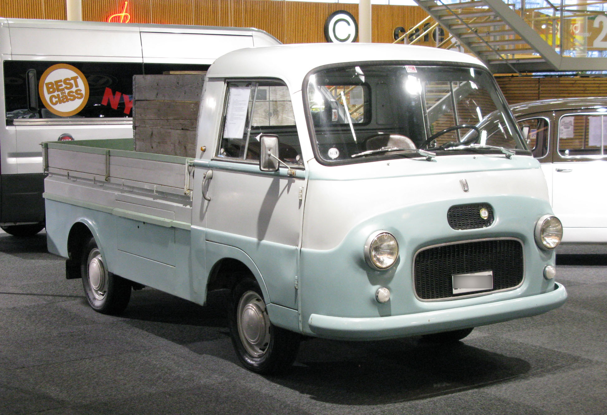 1961 Fiat 1100T2